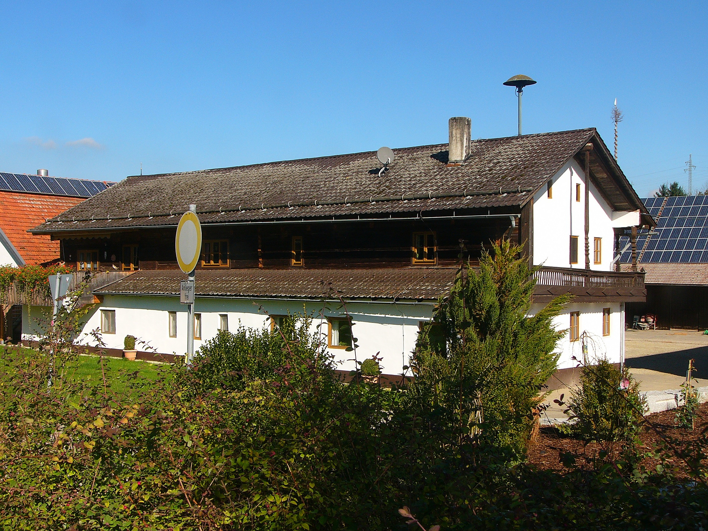 Wohnstallhaus eines Vierseithofs und ehemaliges Gasthaus; zweigeschossiger Flachsatteldachbau mit Trauf- und Giebelschrot, Mitte 19. Jahrhundert; Nebengebäude mit ehemaligen Tanzboden, zweigeschossiger Satteldachbau mit Blockbau im Obergeschoss, gleichzeitig. This is a photograph of an architectural monument.